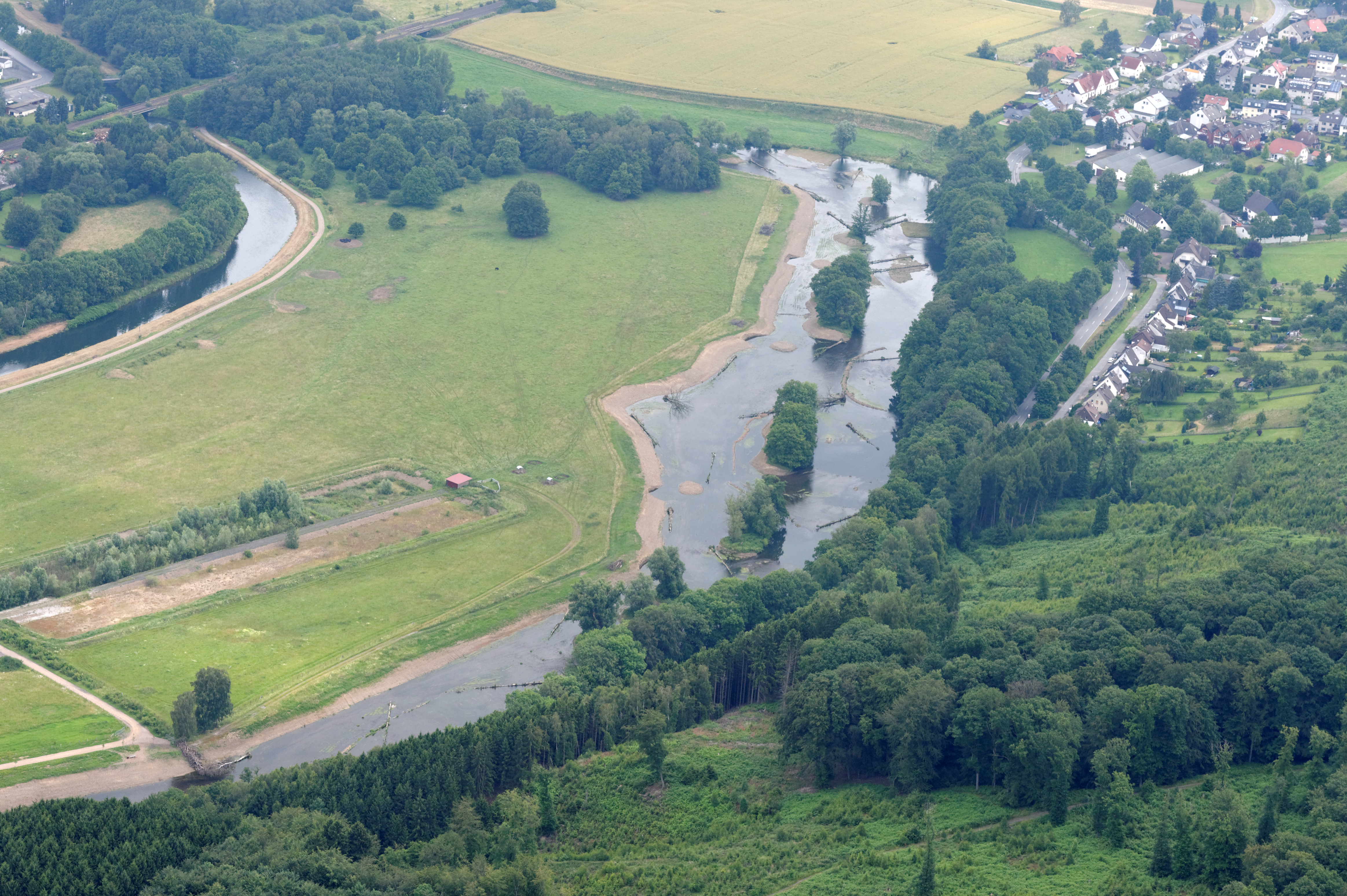 Fotoflug Sauerland Nord. Links Rand von Wickede (Ruhr), Ruhr mit Renaturierungen (Naturschutzgebiet „Ruhraue“) und rechts Echthausen.